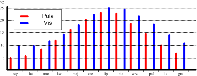 Średnie temperatury miesięczne na Vis i na Puli